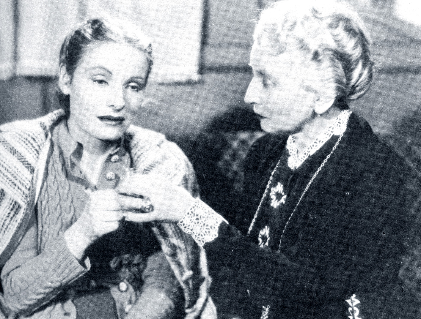 Bianca Doria ed Emma Gramatica in "Piccolo hotel" (Ballerini, 1939)